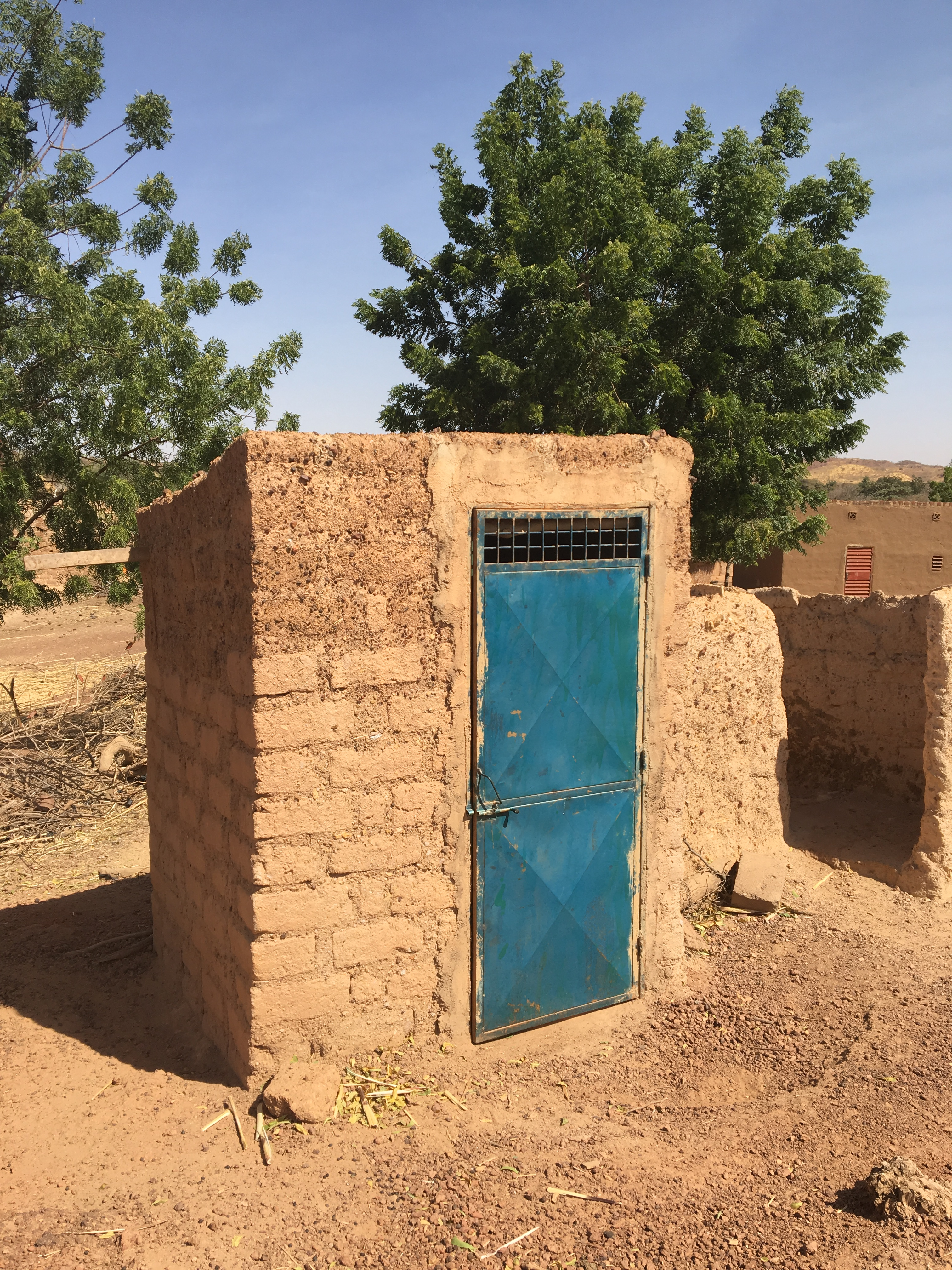 Latrine de Bogonam Peulh